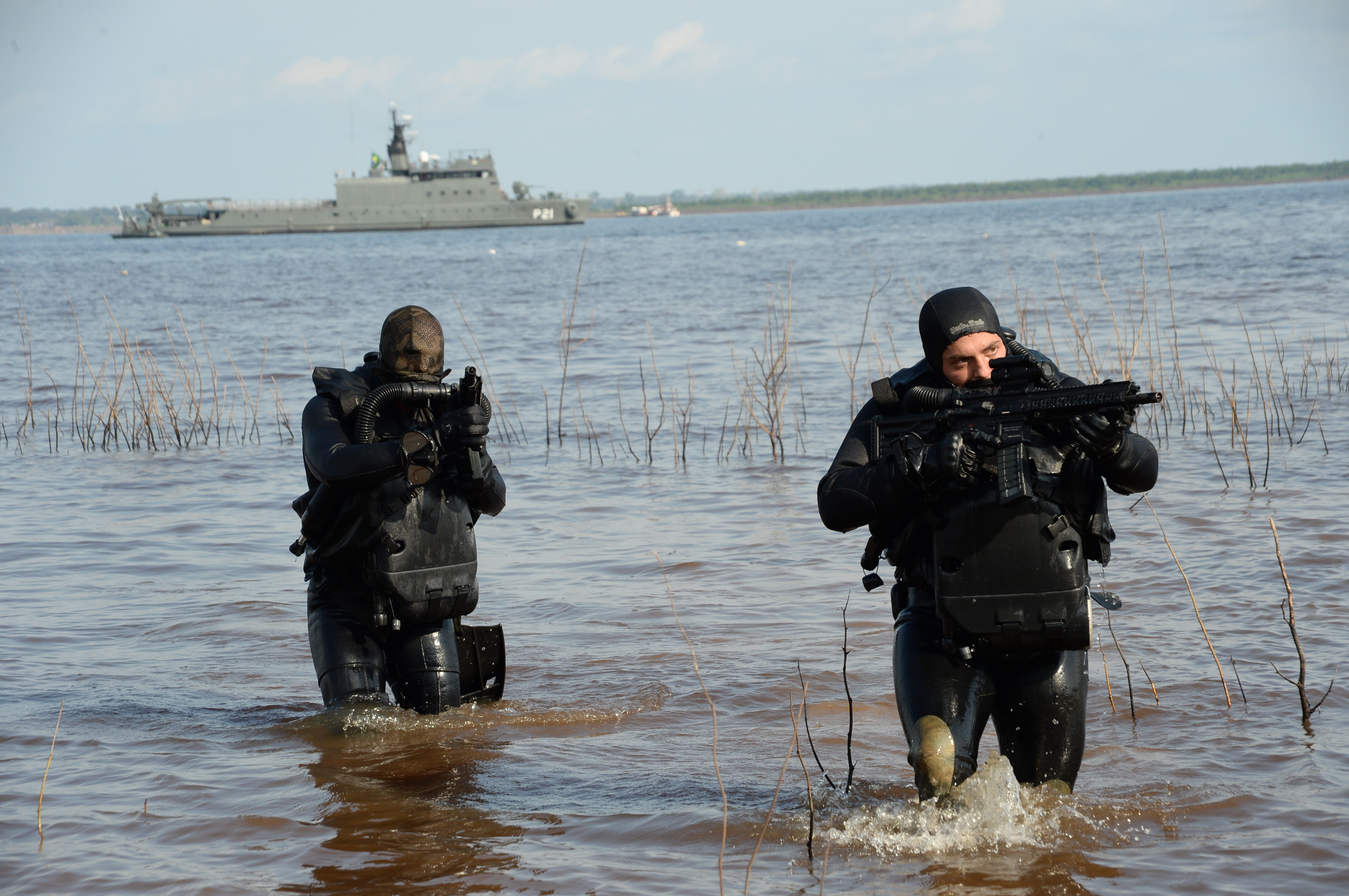 14/10/2014, Manaus - AM Fotos: Jorge Cardoso